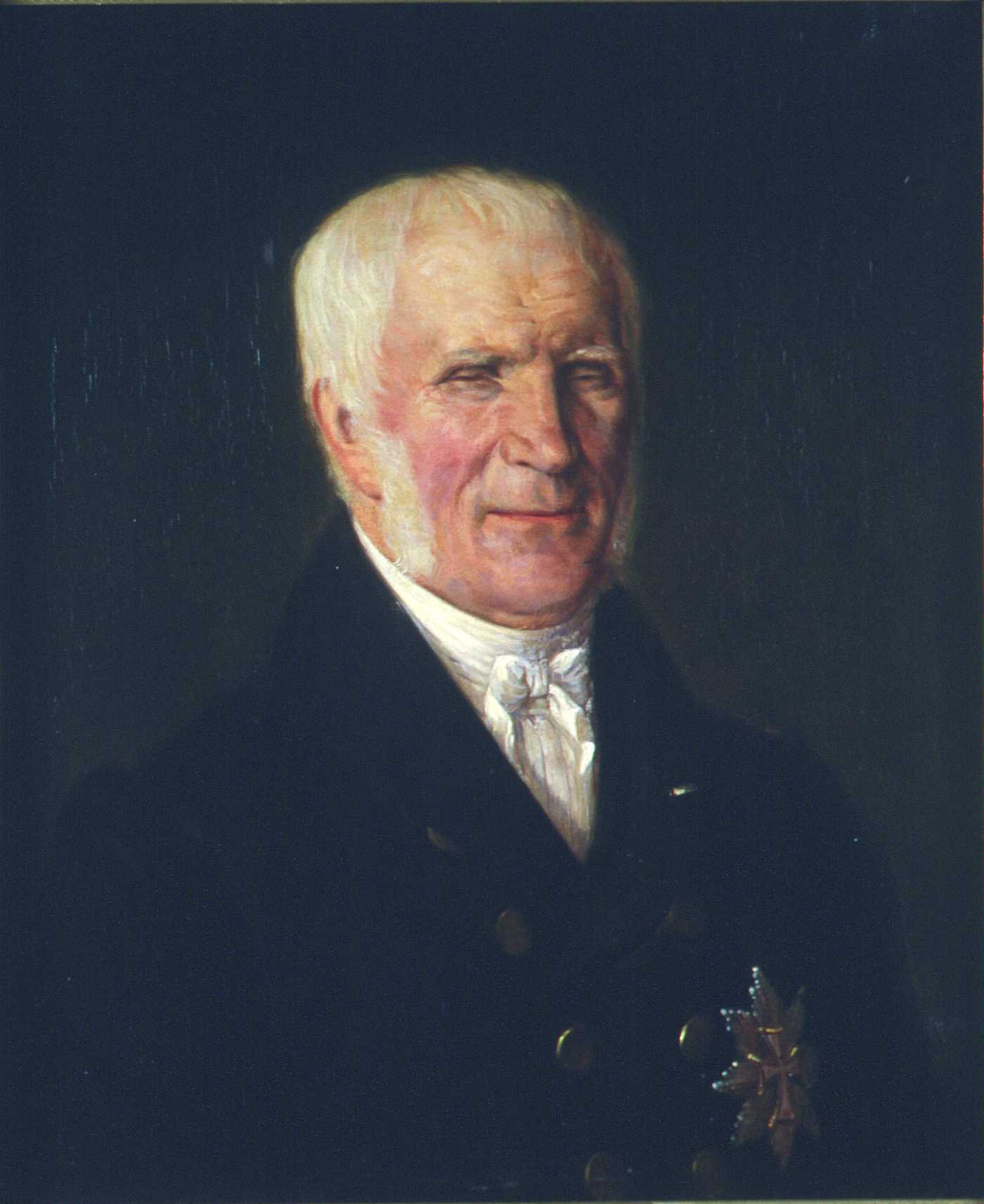 Ludvig Frederik Brock. Fra Selskapet til Eidsvoldsbygningens Udstyr. Selskapet ble opprettet 1895 og nedlagt i 1918, og samlet inn gjenstander og inventar til Eidsvollsbygningen til grunnlovsjubileet i 1914. Kopi malt av J. Grennes. Brock deltok på notabelmøtet 16.feb 1814.